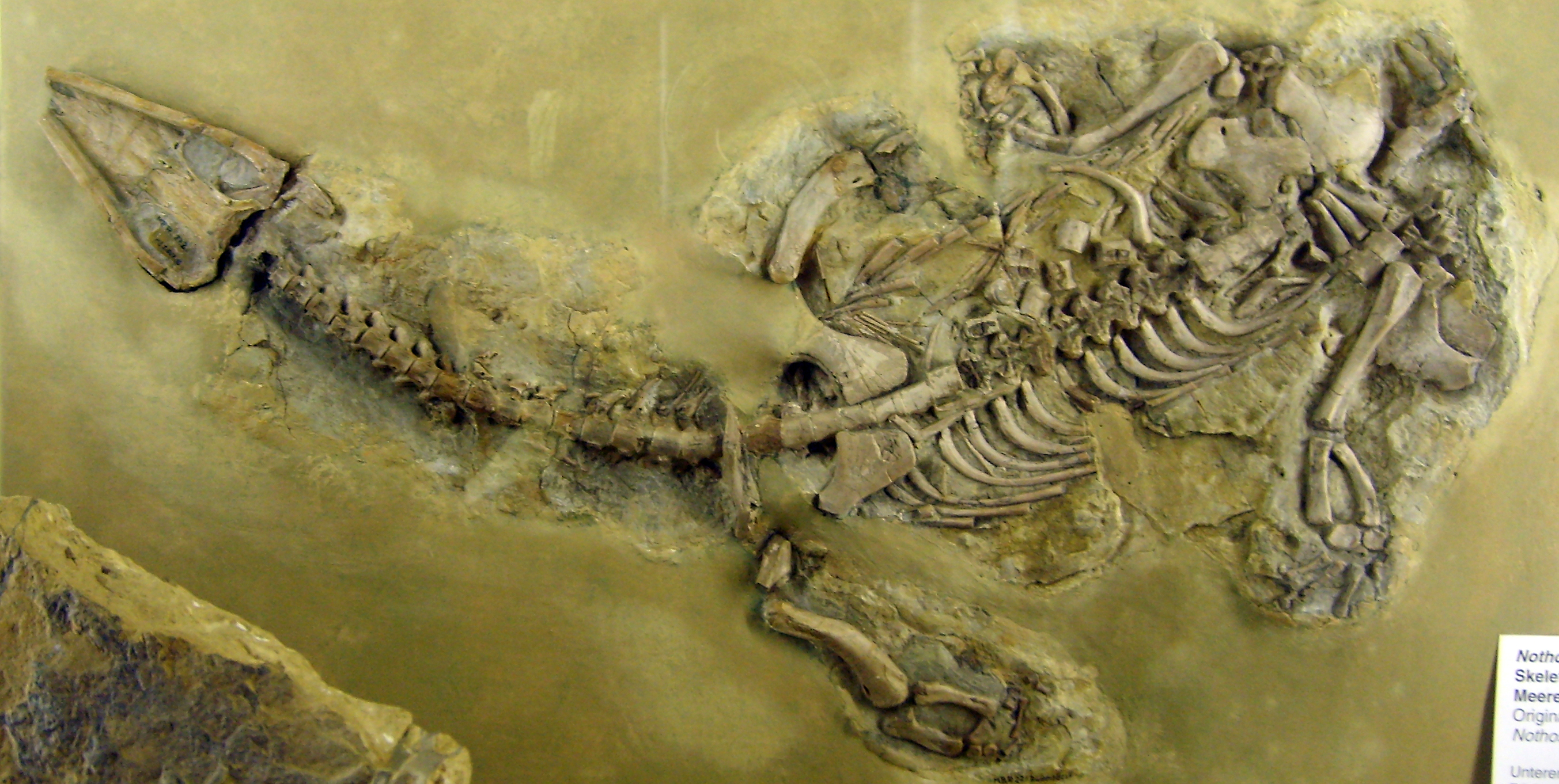 Nothosaurus raabi fossil at the Museum für Naturkunde, Berlin.